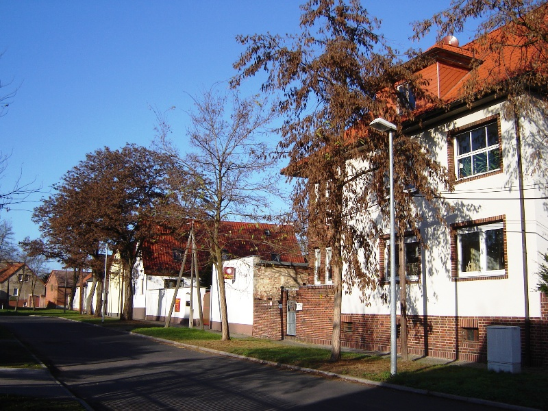 Magdeburg-Rothensee, Akazienstraße